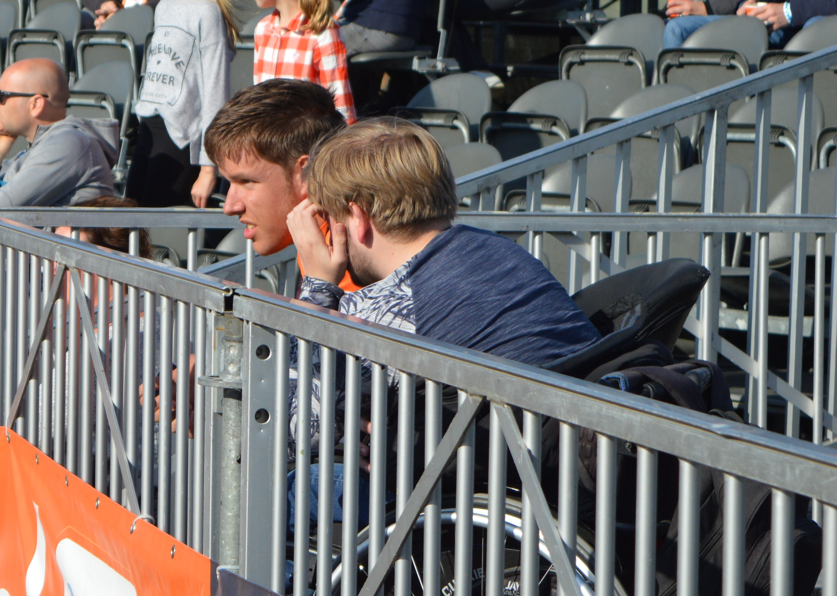 Jelle van Gorkum, who won silver during the Olympic Games in Rio de Janeiro 2016, watching during the BMX World Cup in Papendal, The Netherlands.